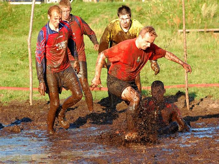 Zbigniew Masternak (BKS Roztocze)